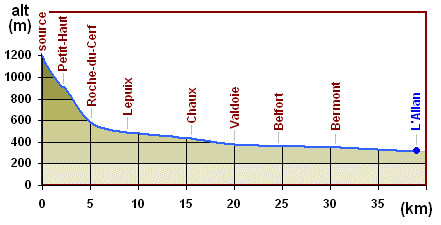 Graphe : profil de la rivière La Savoureuse (Territoire de Belfort) entre sa source et le confluent avec l'Allan Tracé par F5ZV le 06/03/2006 d'après des données relevées sur cartes IGN